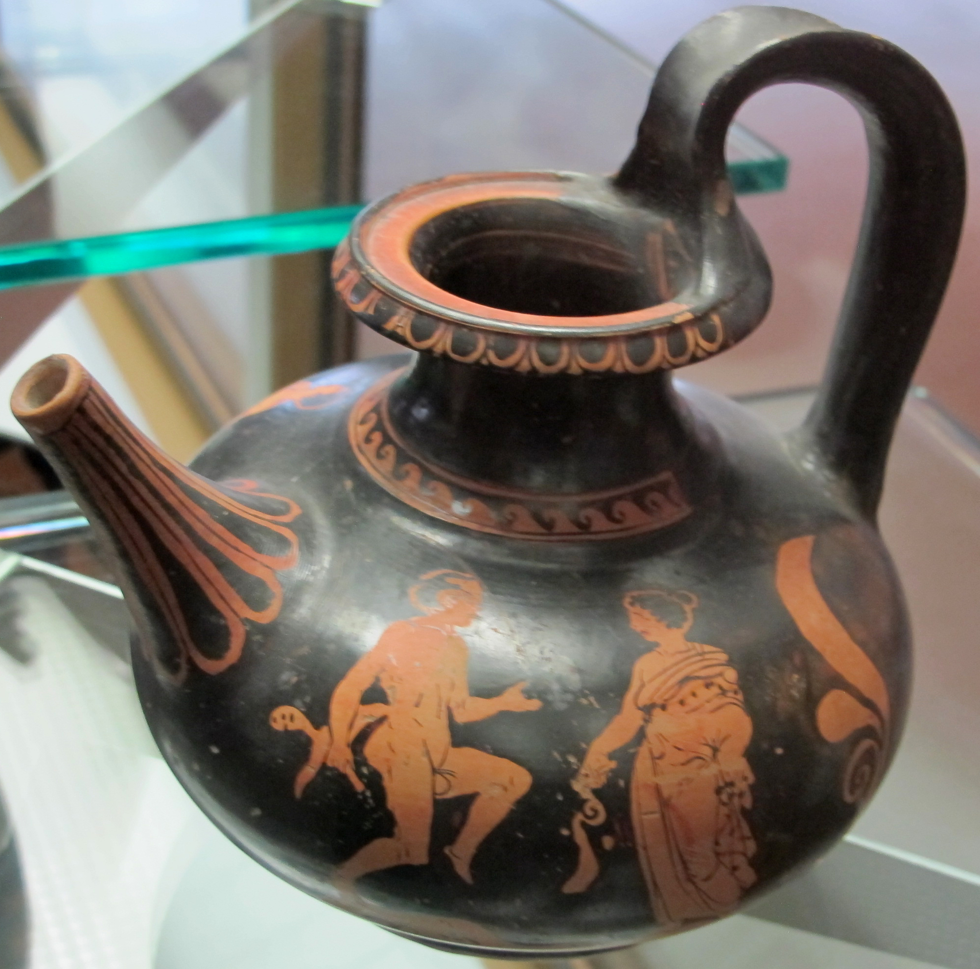 Apulia, guttus lucano a figure rosse da Ruvo, con due giovani (A) , satiro e menade (B), 420-370 ac. ca